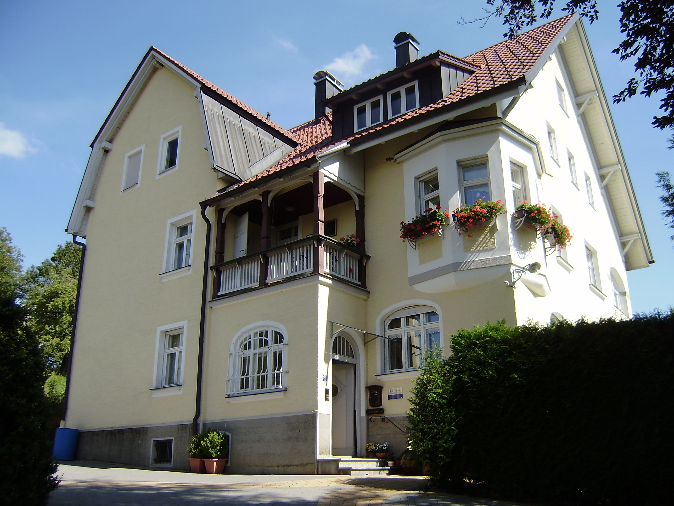 Villa Wachter, Am Straußberg, Ellhofen, von Südwesten. Baumeister Christian Bufler, der ältere Bruder des bekannteren Georg Bufler baute diese repräsentative Villa für den erfolgreichen Käsegroßhändler Baptist Wachter im Jahre 1908